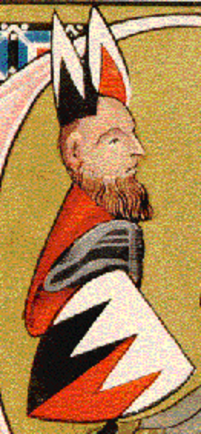 Darstellung Wappen des Ernst von Kirchberg, Verfasser der mecklenburgischen Reimchronik vom Jahre 1378, ritterlichen Standes und dem Geschlechte der von Kerkberg oder Kerberg angehörig, und zwar der schwarzen Linie des Geschlechts, welche Jahrhunderte hindurch auf Krümmel in Mecklenburg saß und im 16. Jahrhundert in den Stammsitz Kerberg in der Prignitz folgte.